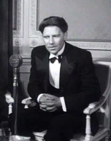 A. den Doolaard, Nederlands schrijver .